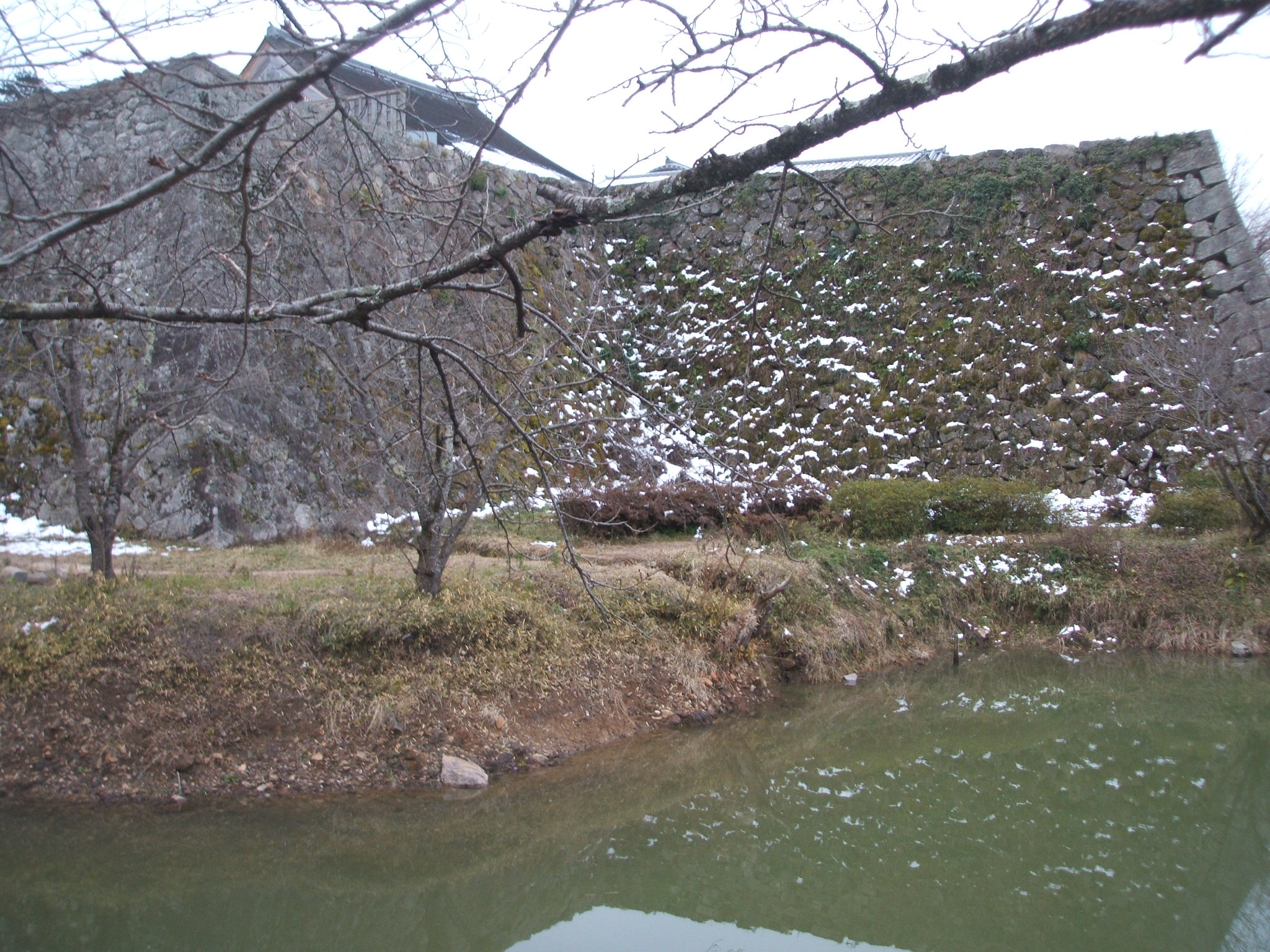 篠山城、内堀石垣